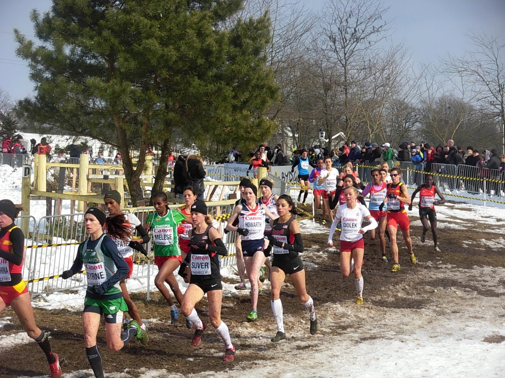 Mistrzostwa Świata w Biegach Przełajowych IAFF 2013 w Leśnym Parku Kultury i Wypoczynku Myślęcinek w Bydgoszczy